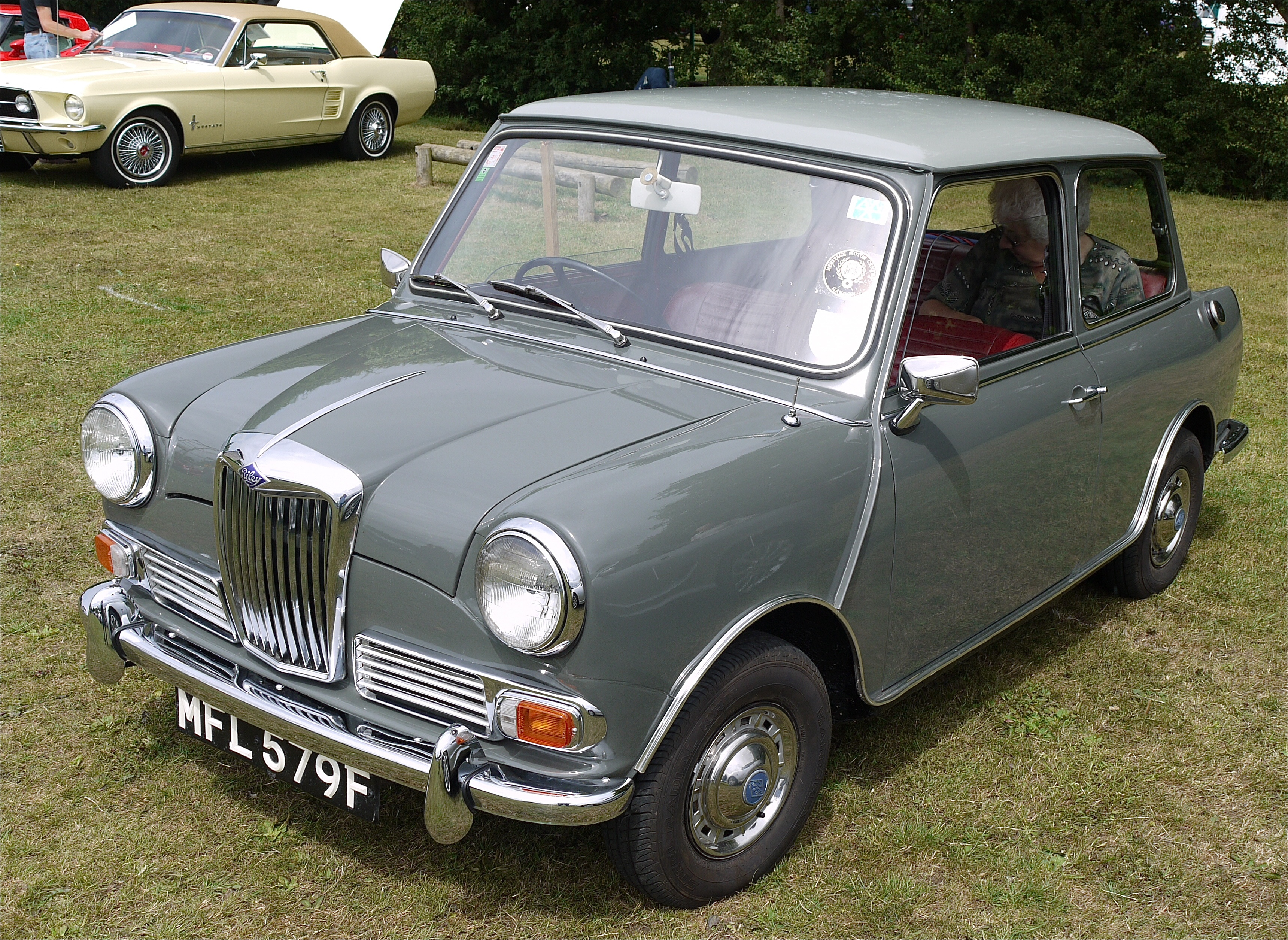 Panasonic G1 14-45 Lens